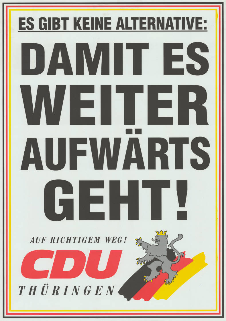 Es gibt keine Alternative: Damit es weiter aufwärts geht! Auf richtigem Weg! CDU Thüringen Abbildung: Thüringer Löwe - Nationalfarben Kommentar: Vgl. Plakat Nr. 10-037-104 Plakatart: Textplakat Allgemein Auftraggeber: CDU LV Thüringen Objekt-Signatur: 10-037 : 115 Bestand: Landtagswahlplakate Thüringen (10-037) GliederungBestand10-18: Landtagswahlplakate Thüringen (10-037) » CDU Lizenz: KAS/ACDP 10-037 : 115 CC-BY-SA 3.0 DE